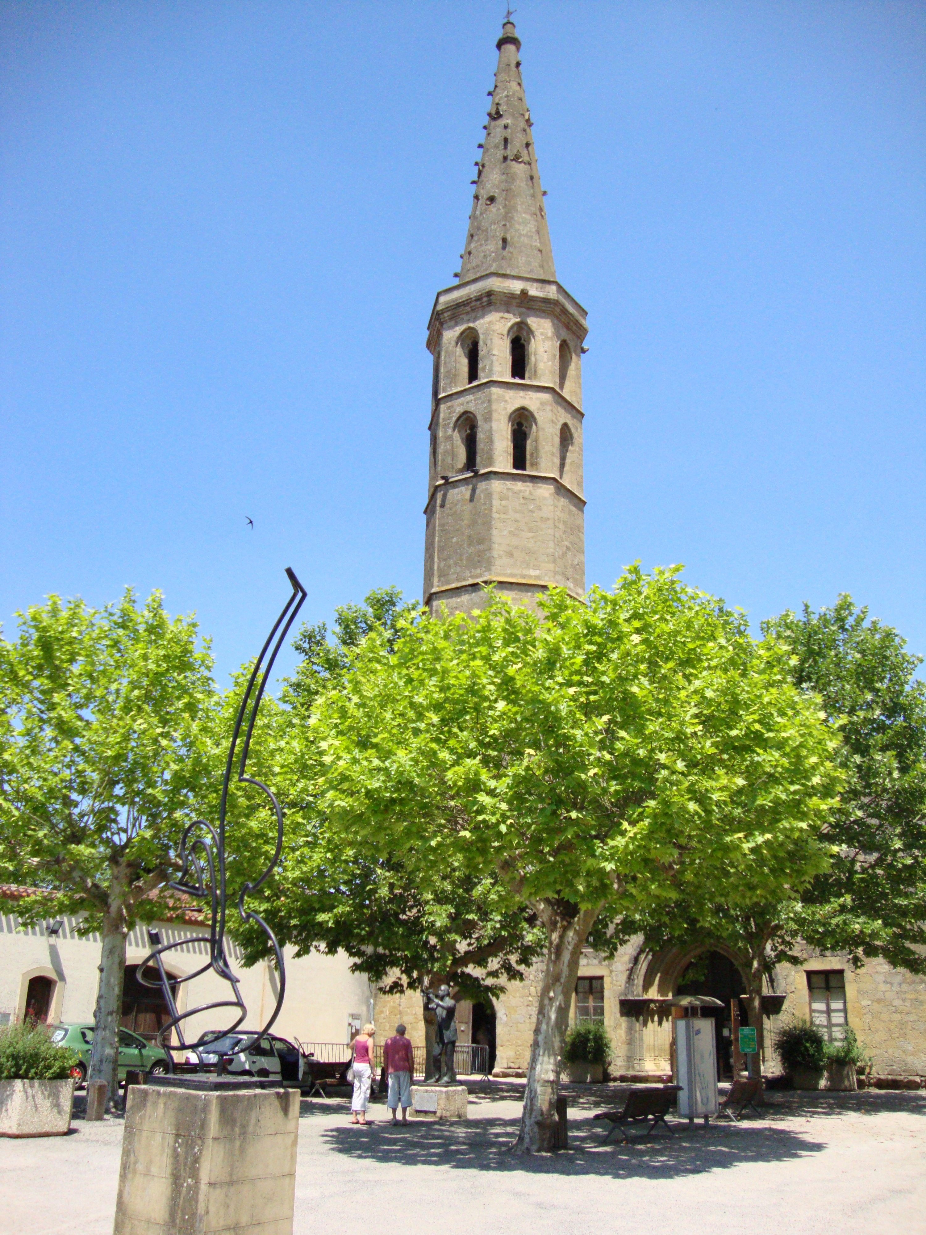 Marciac (Gers, Fr) le musée de jazz dans l'ancien monastère des Augustins.